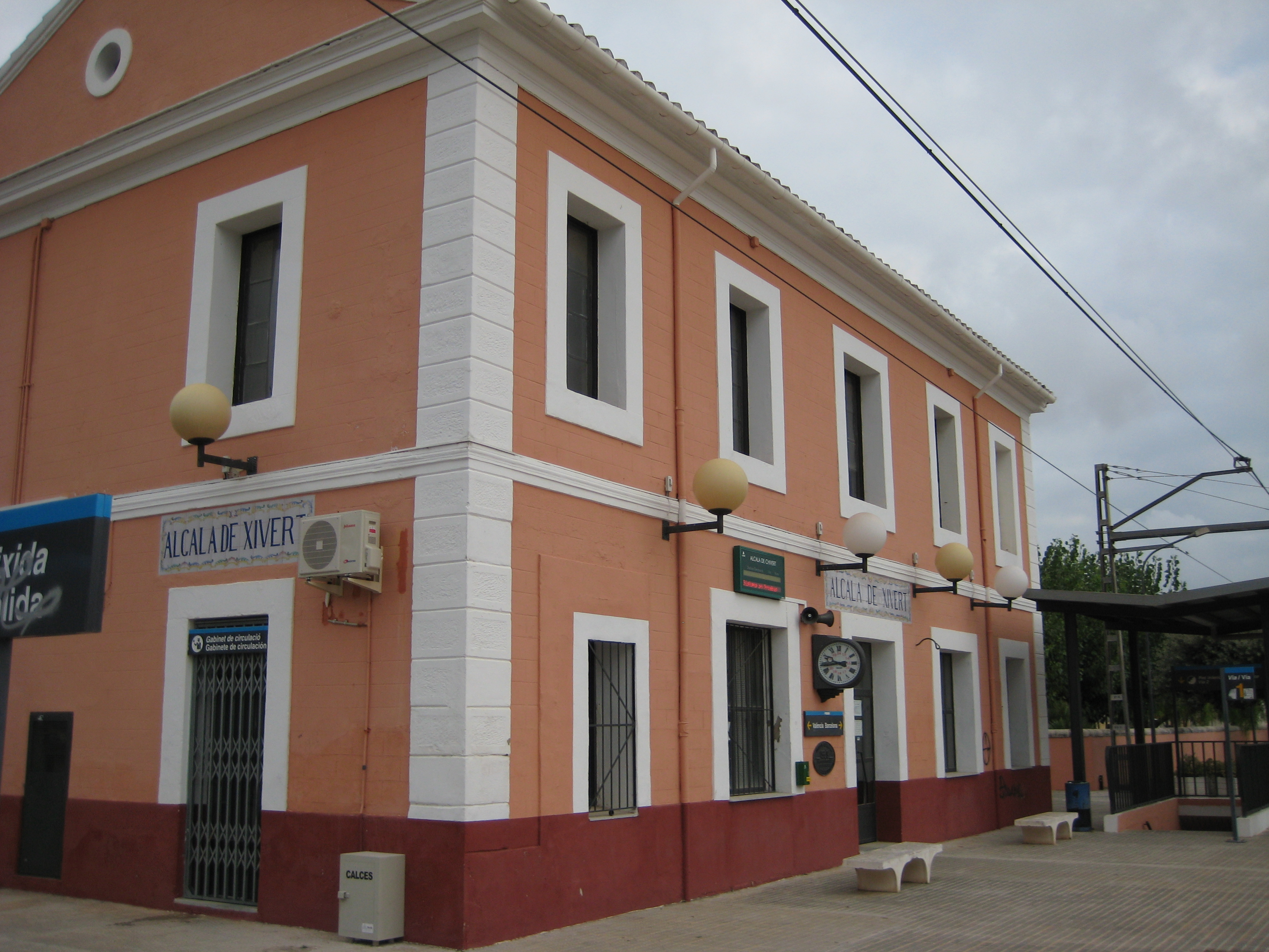 Estació de tren d'Alcalà de Xivert